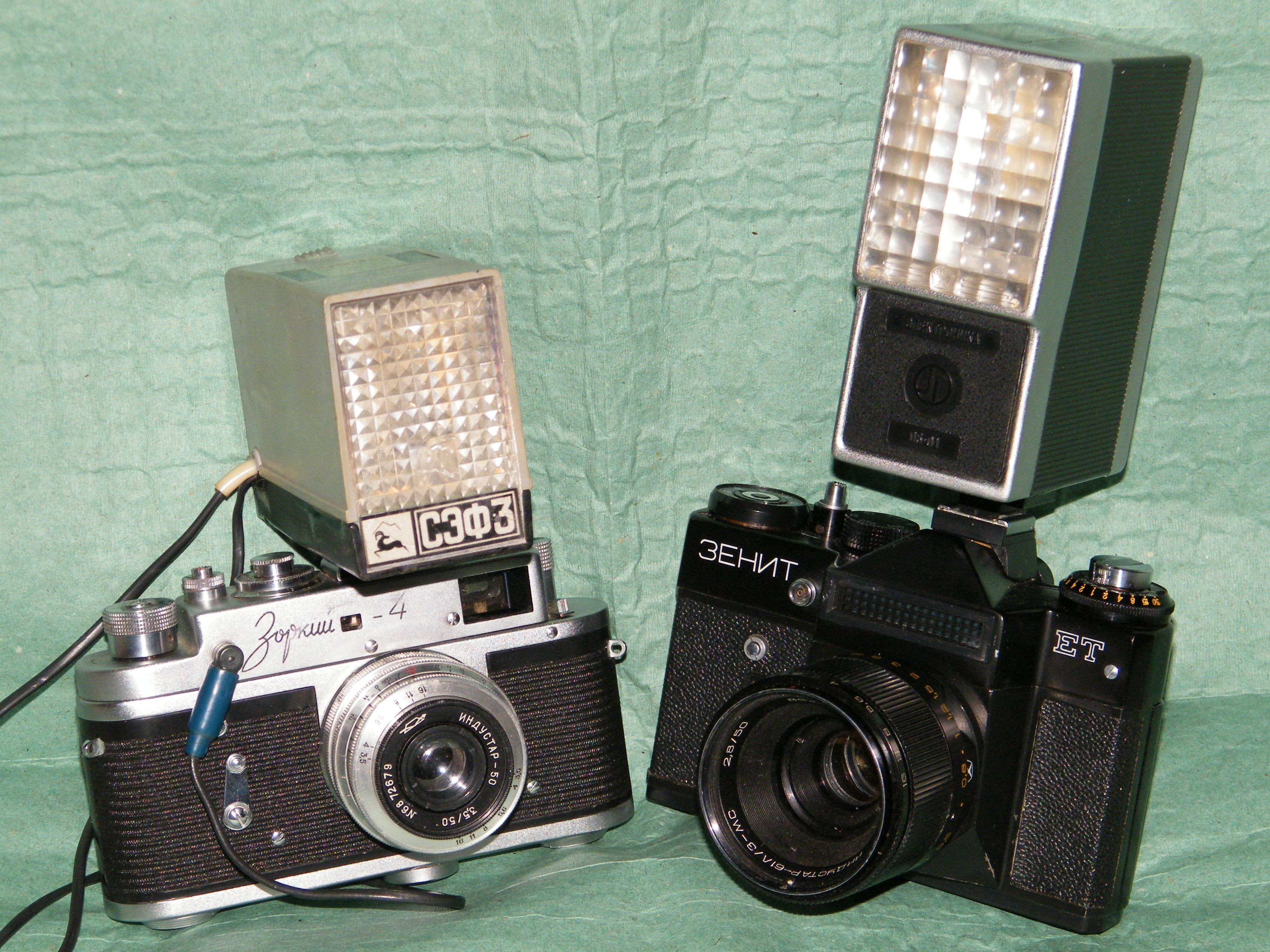 Фотовспышки СССР середины 80-х годов. Сетевая (переменный ток 220 вольт) фотовспышка СЭФ-3 на фотоаппарате Зоркий-4. Фотовспышка Электроника Л5-01 на фотоаппарате Зенит-ЕТ. Фотовспышка Электроника Л5-01 работала от сети переменного тока 220 вольт или от 6 элементов тип АА.